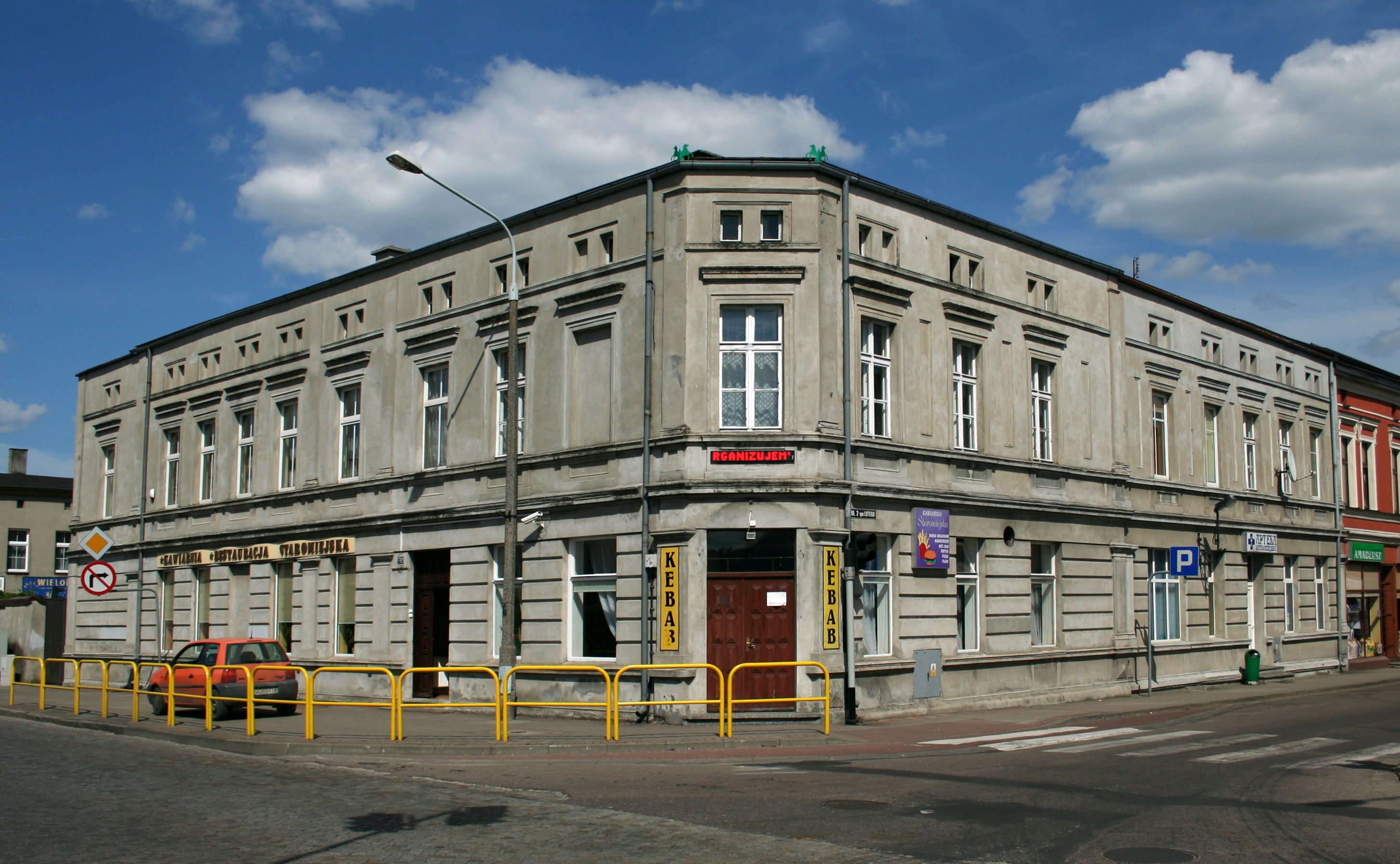 Kamienica w Brusach na skrzyżowaniu ulic gdańskiej i 2 lutego